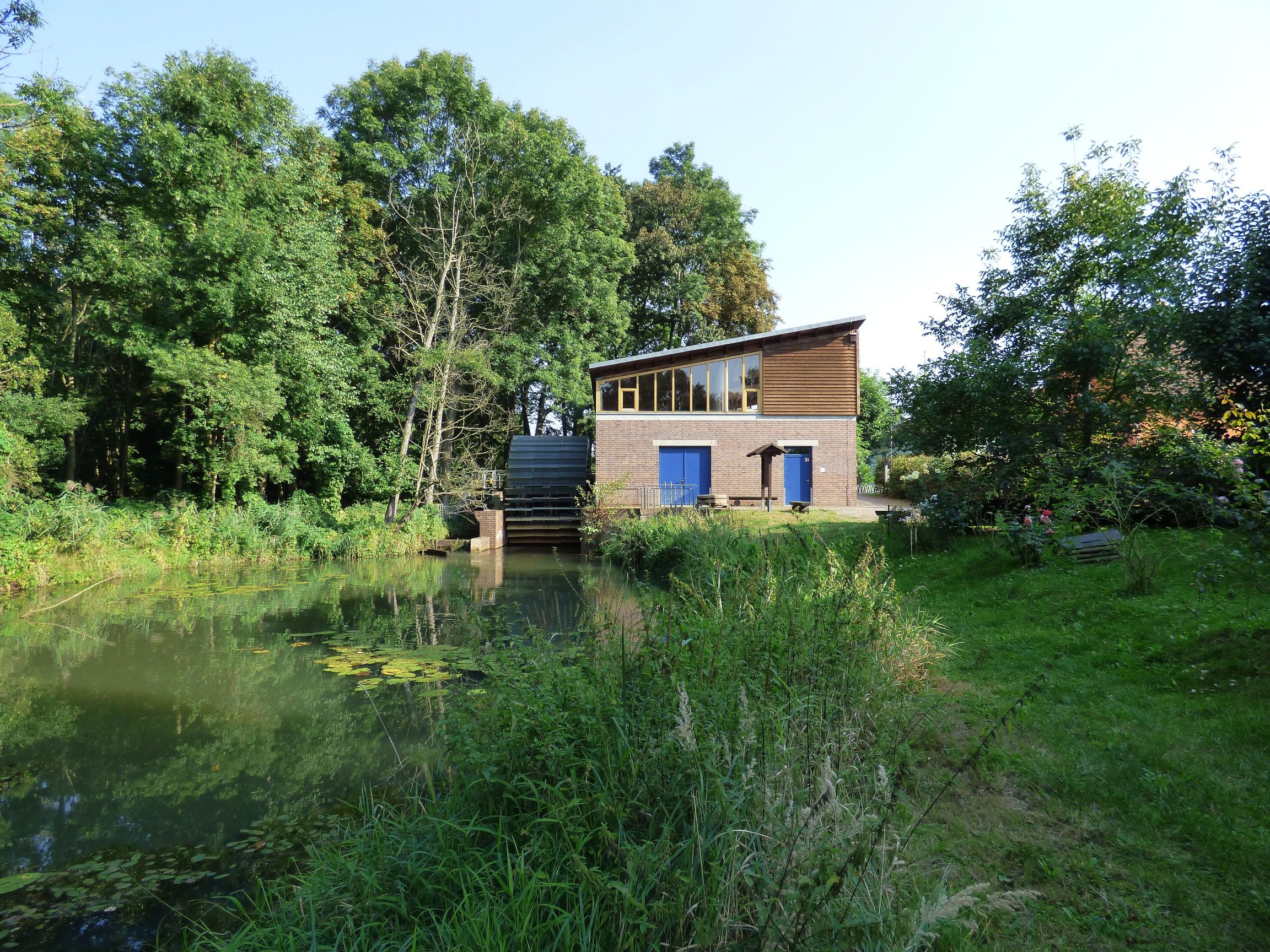 Hochpolgenerator Neumühl